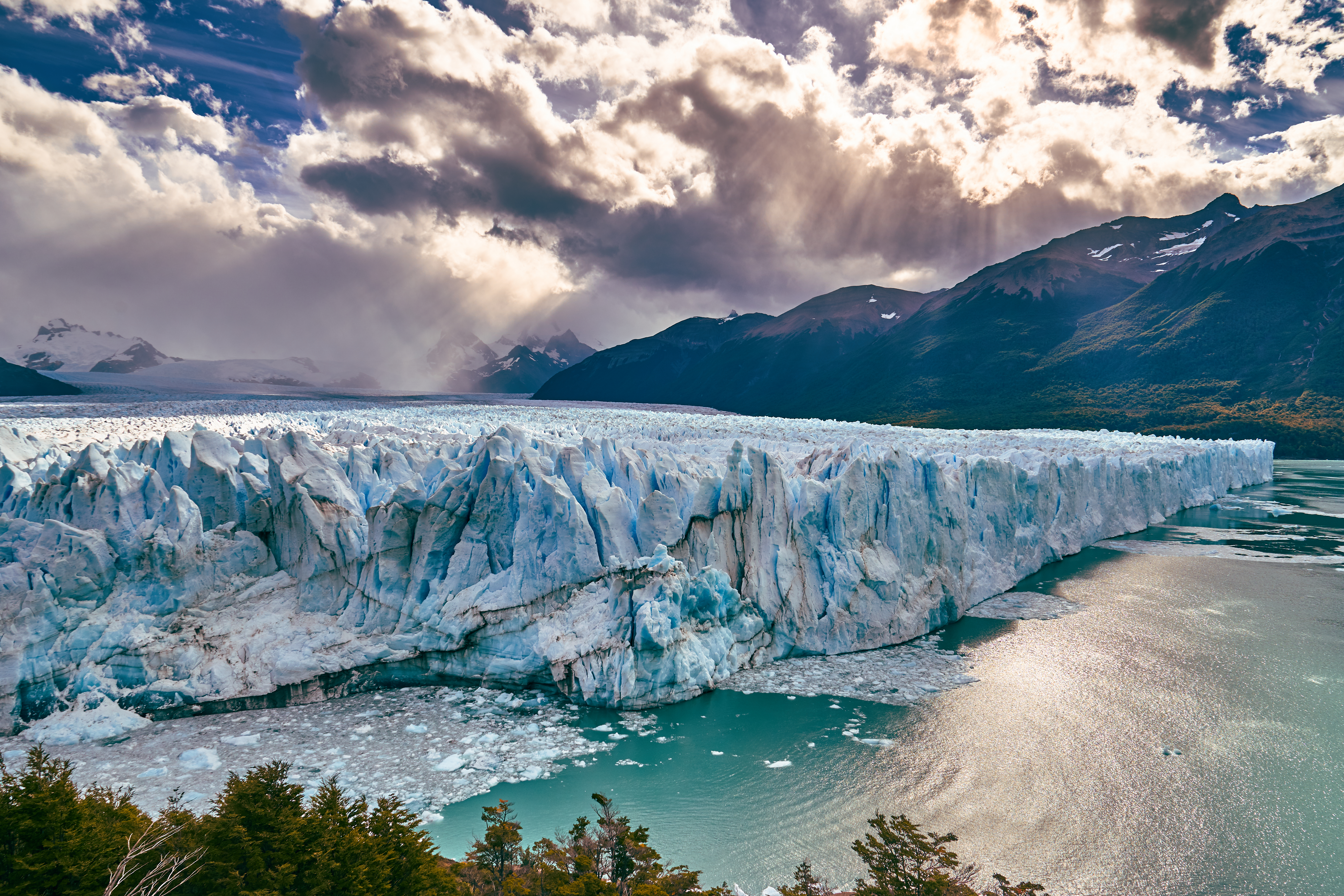 Perito Moreno